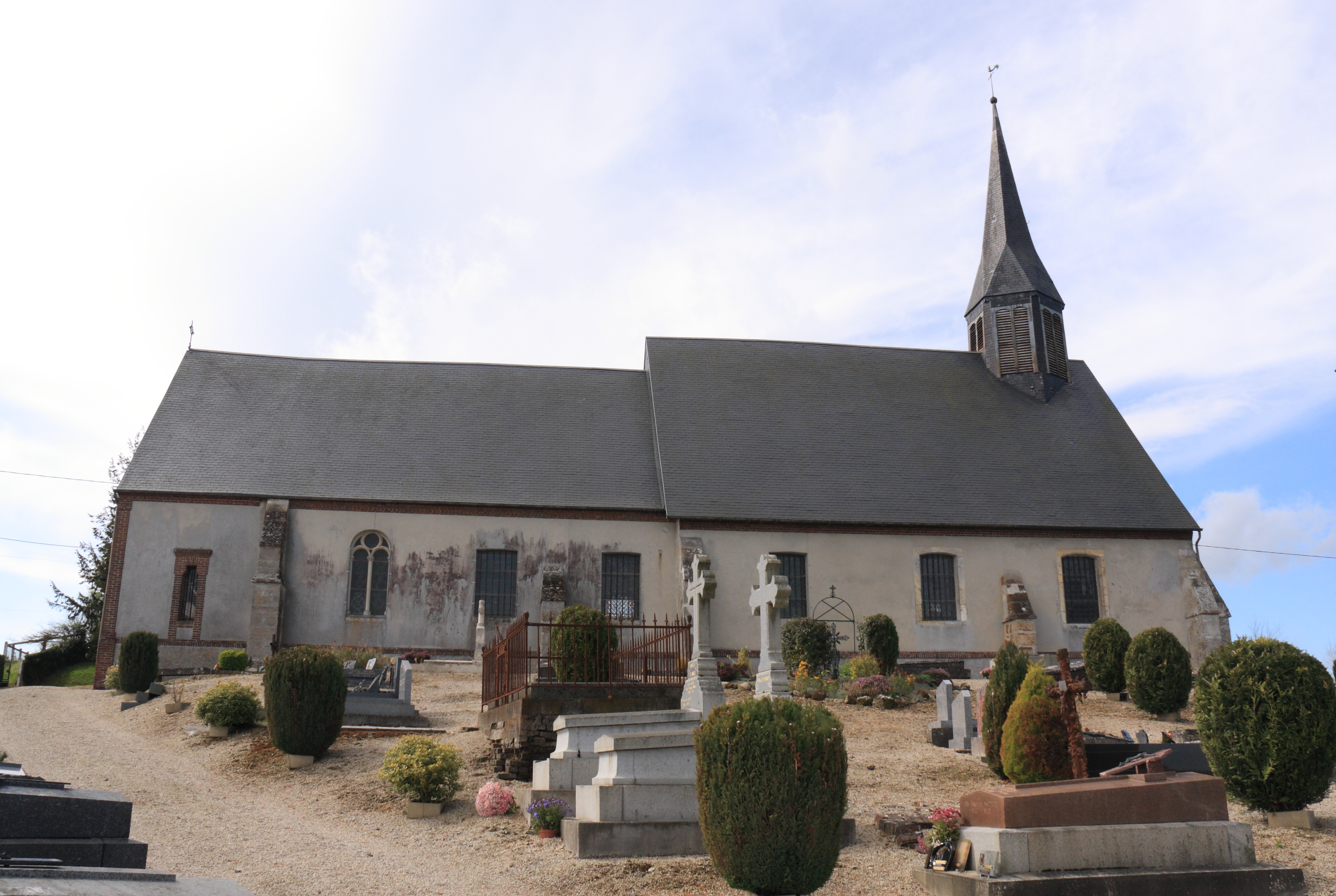 L'église du Renouard